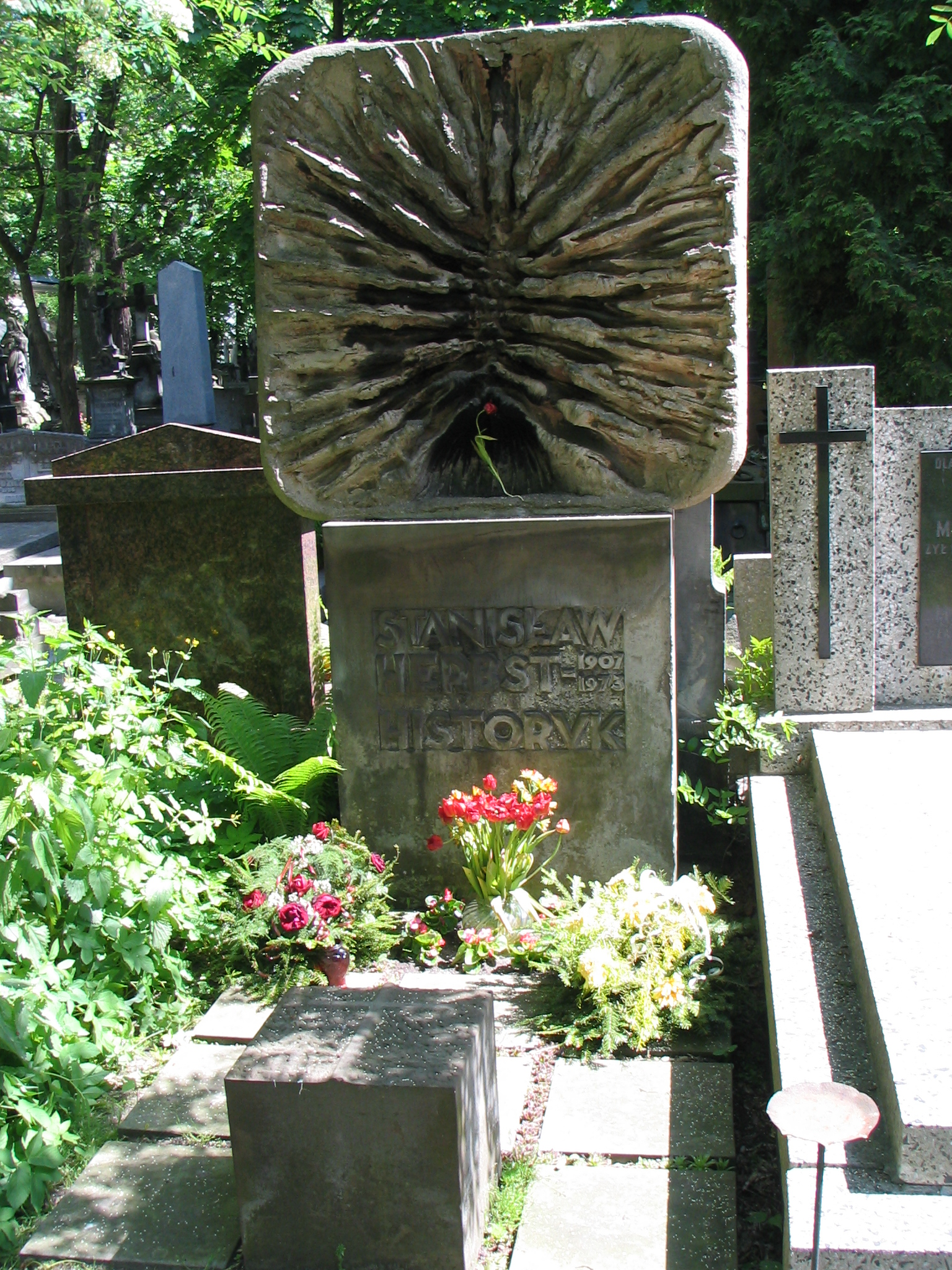 Stanisław Herbst, nagrobek na Cmentarzu Powązkowskim, Warszawa, 14 maja 2008.